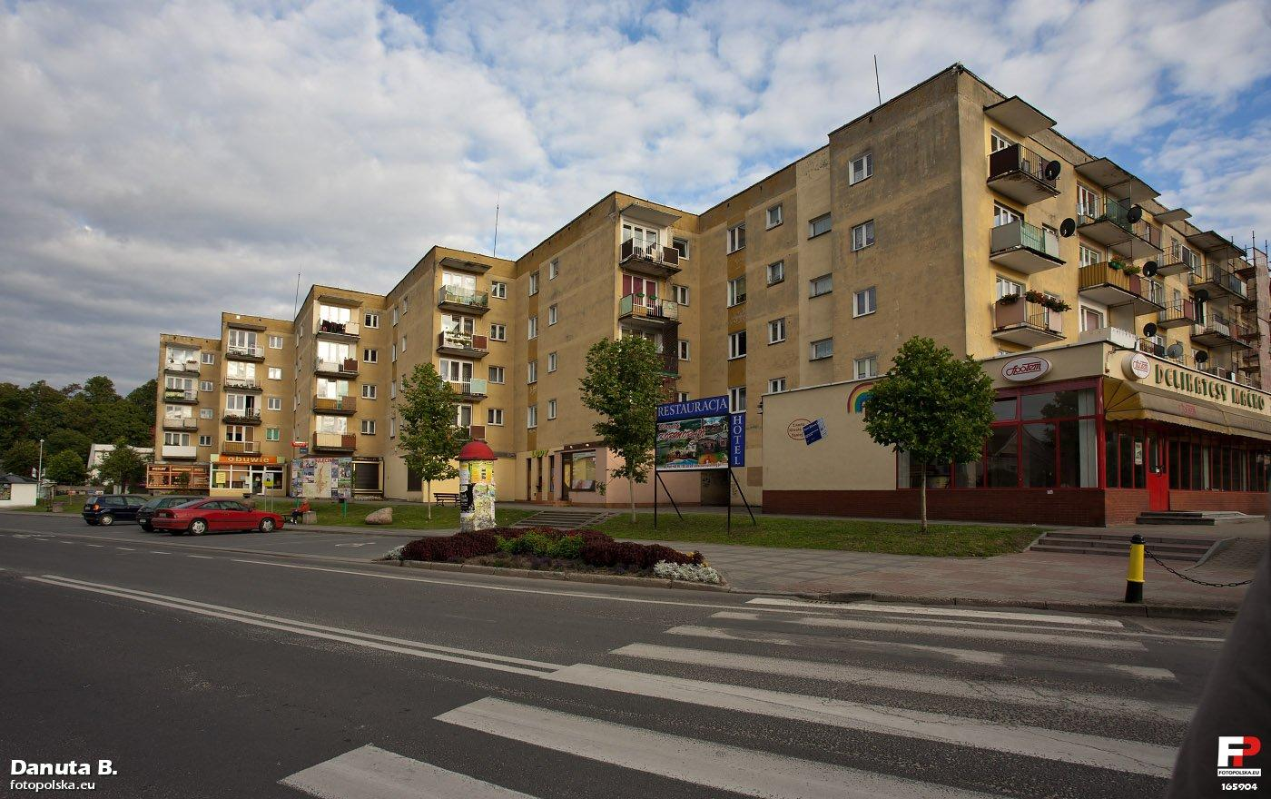 Ząbki współczesnych bloków ze swą agresywną urbanistyką, zastąpiły istniejące w tym miejscu, do 1945 r. kamienice . Samo centrum - z prawa rynek, za plecami kościół św. Mikołaja .